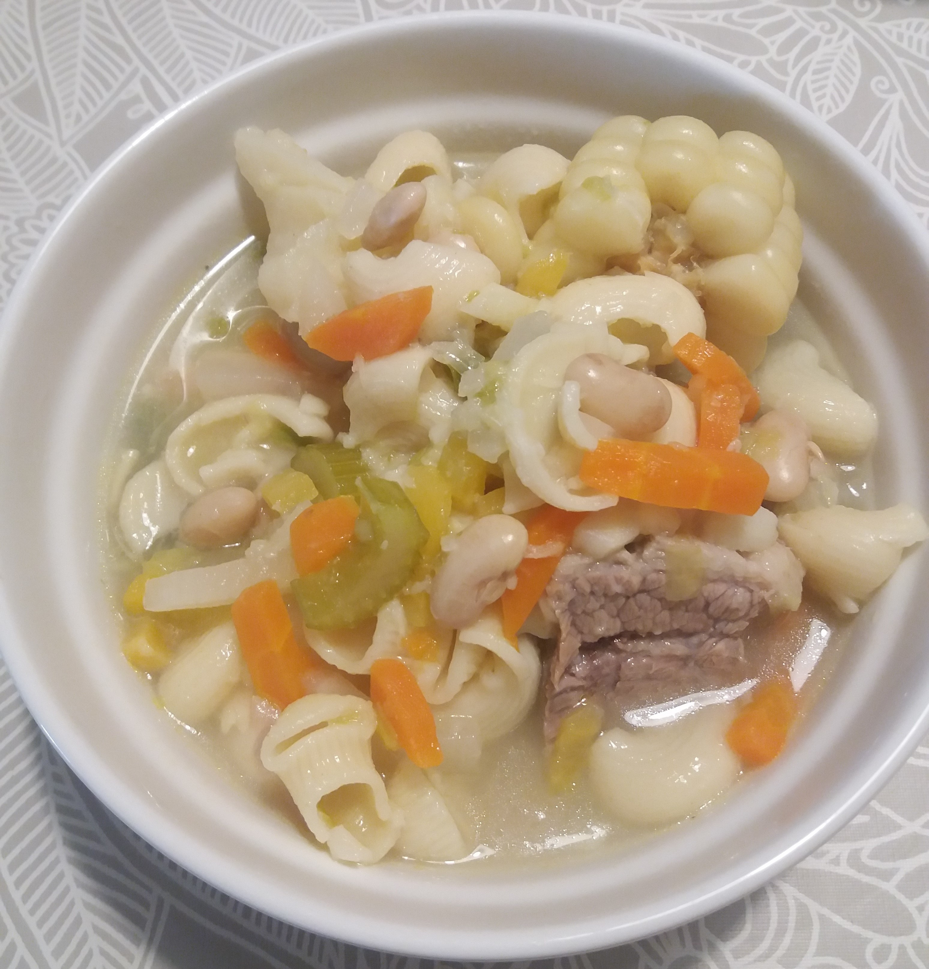 Sopa cazuela